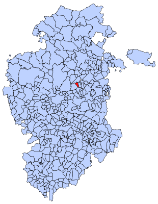 Santa Olalla de Bureba en Burgos